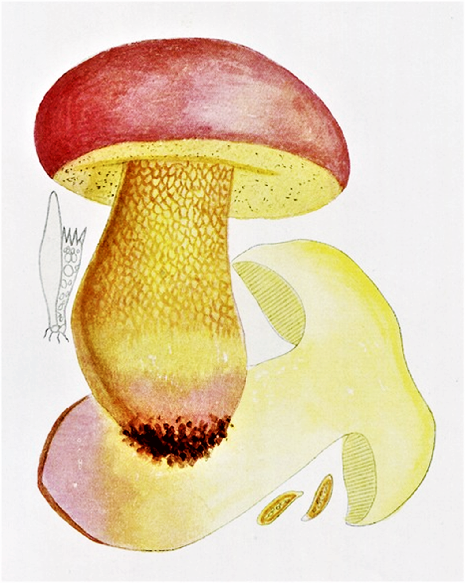 Giacomo Bresadola: Boletus regius Krombh. (1832)